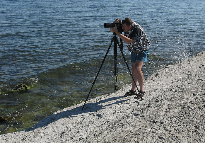 Eesti bioloog ja loodusfotograaf Urmas Tartes.